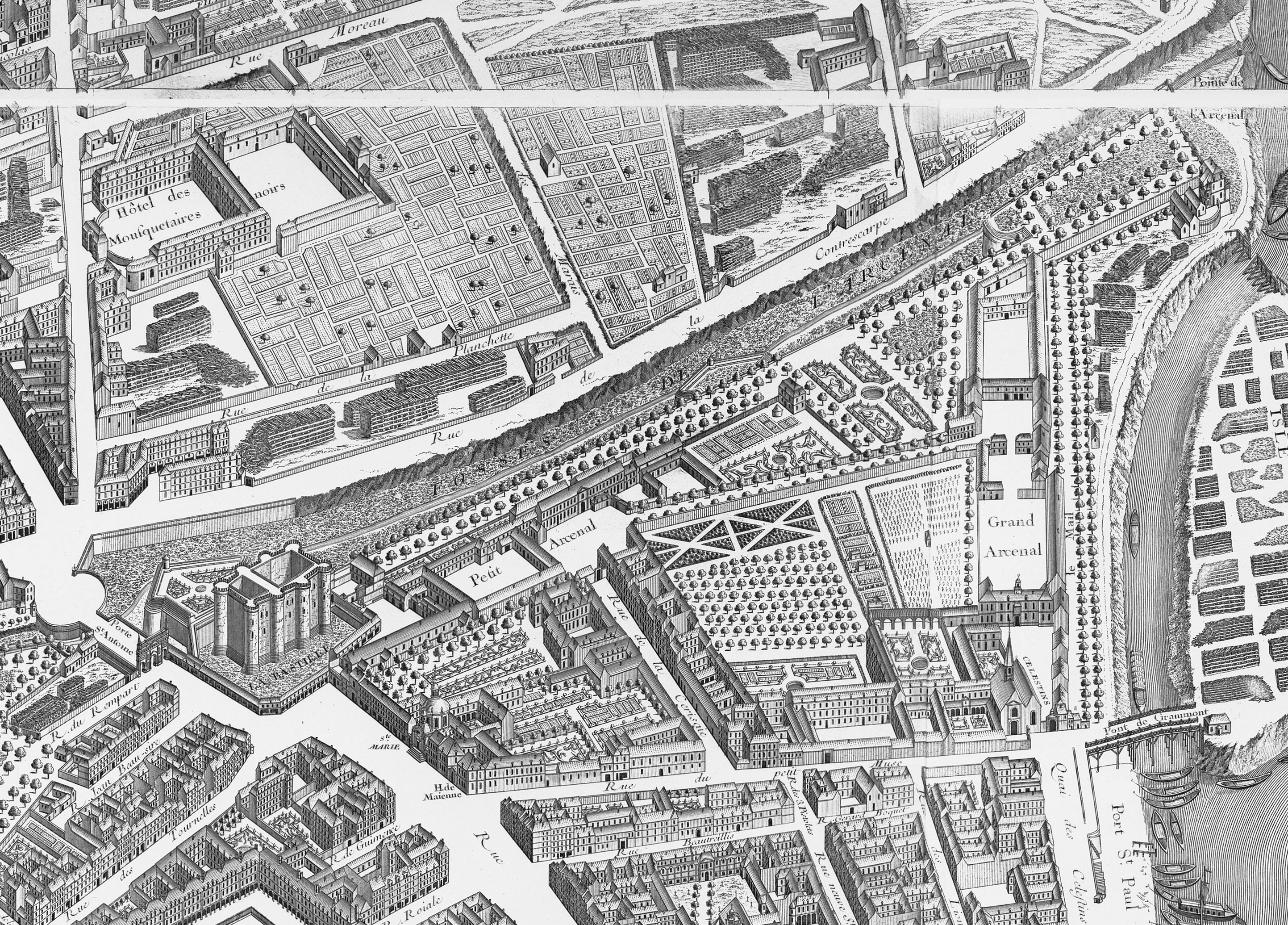 Détail du plan de Turgot de 1734–1736, dans lequel l'on aperçoit les Fossés de l'Arsenal (depuis la Bastille jusqu'à la Pointe de l'Arsenal) telles qu'elles étaient à l'époque.